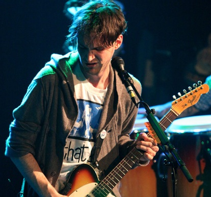 Josh Klinghoffer en septembre 2011 à Los Angeles.